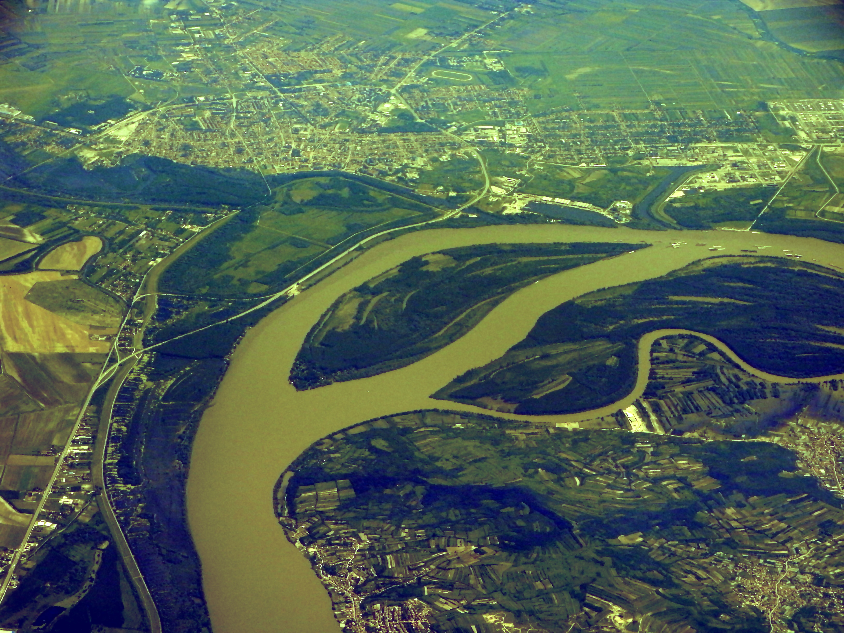 Pančevo (RS), Donau mit Mündung des Temesch und Insel Forkontumaz.